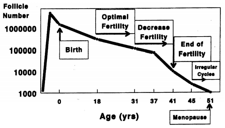 Ménopause, Evolution nombre ovocyte